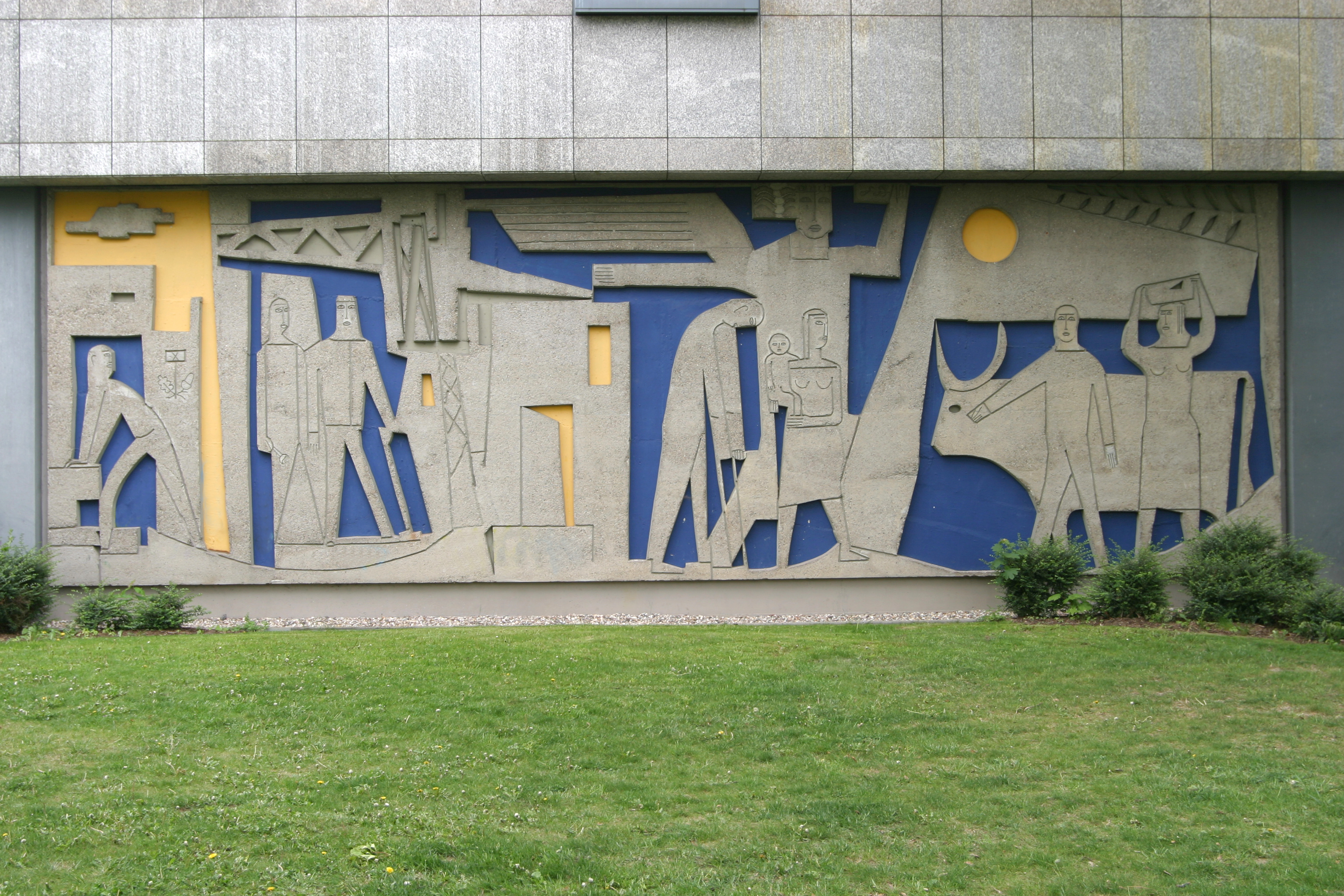 Betonrelief